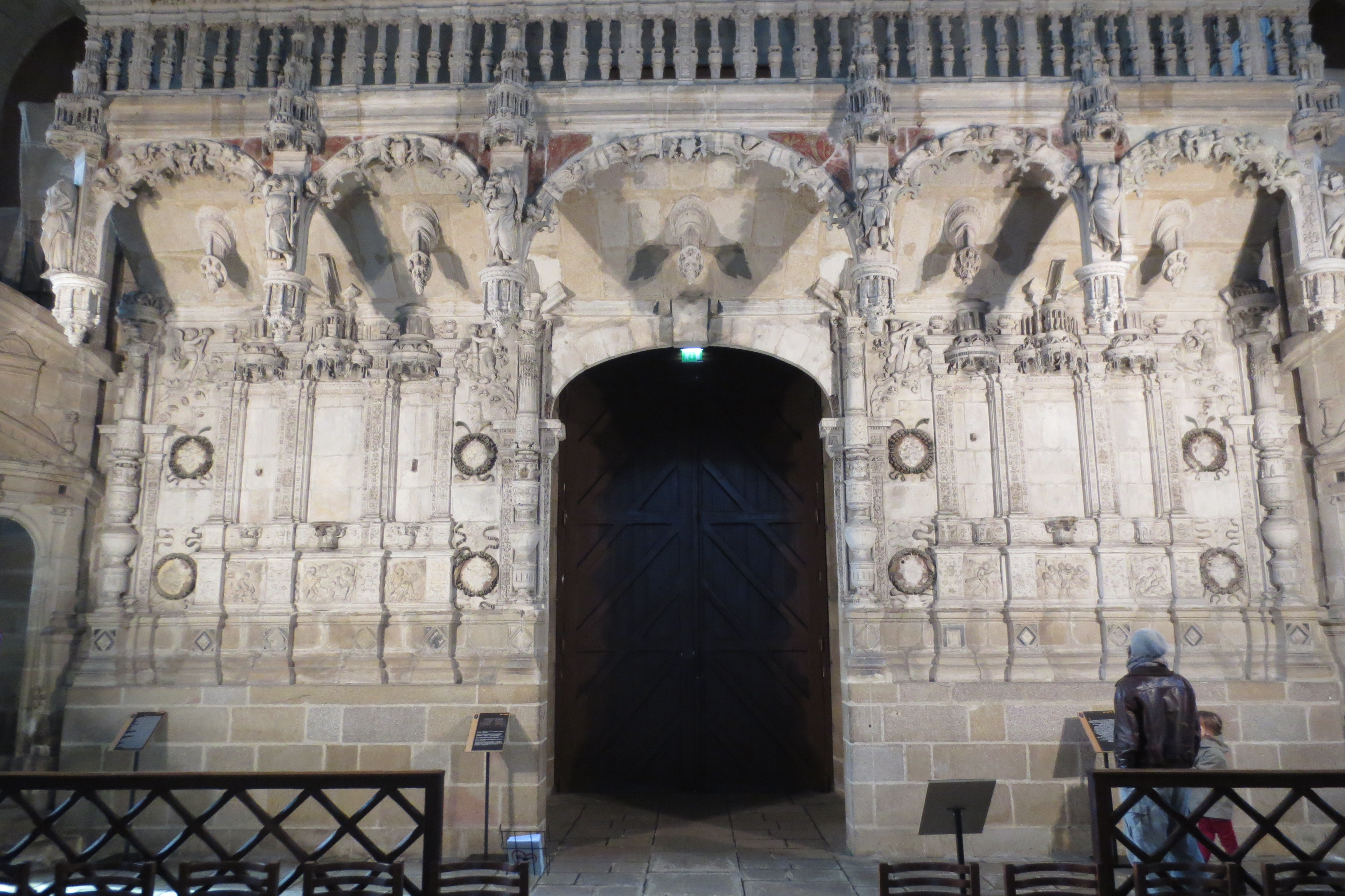 Le jubé se compose d'un portique surmonté d'une galerie reliés entre eux par un encorbellement. Deux escaliers en vis-de-Saint-Gilles (en granite), placés de chaque côté, permettent d'accéder à la galerie. La grande surface de façade est percée d'une porte centrale encadrée de deux larges panneaux qui constituent l'étage inférieur du monument. Cet étage est relié à la tribune par un encorbellement orné de cinq arcs en plein cintre, celui du milieu surmontant la porte centrale plus large que les autres. Ces arcs sont séparés par six culs-de-lampes de forme allongée. La bordure de la tribune compte six niches en pendentifs où sont disposées des statues. Hauteur : 6,50 m Longueur: 11,45 m